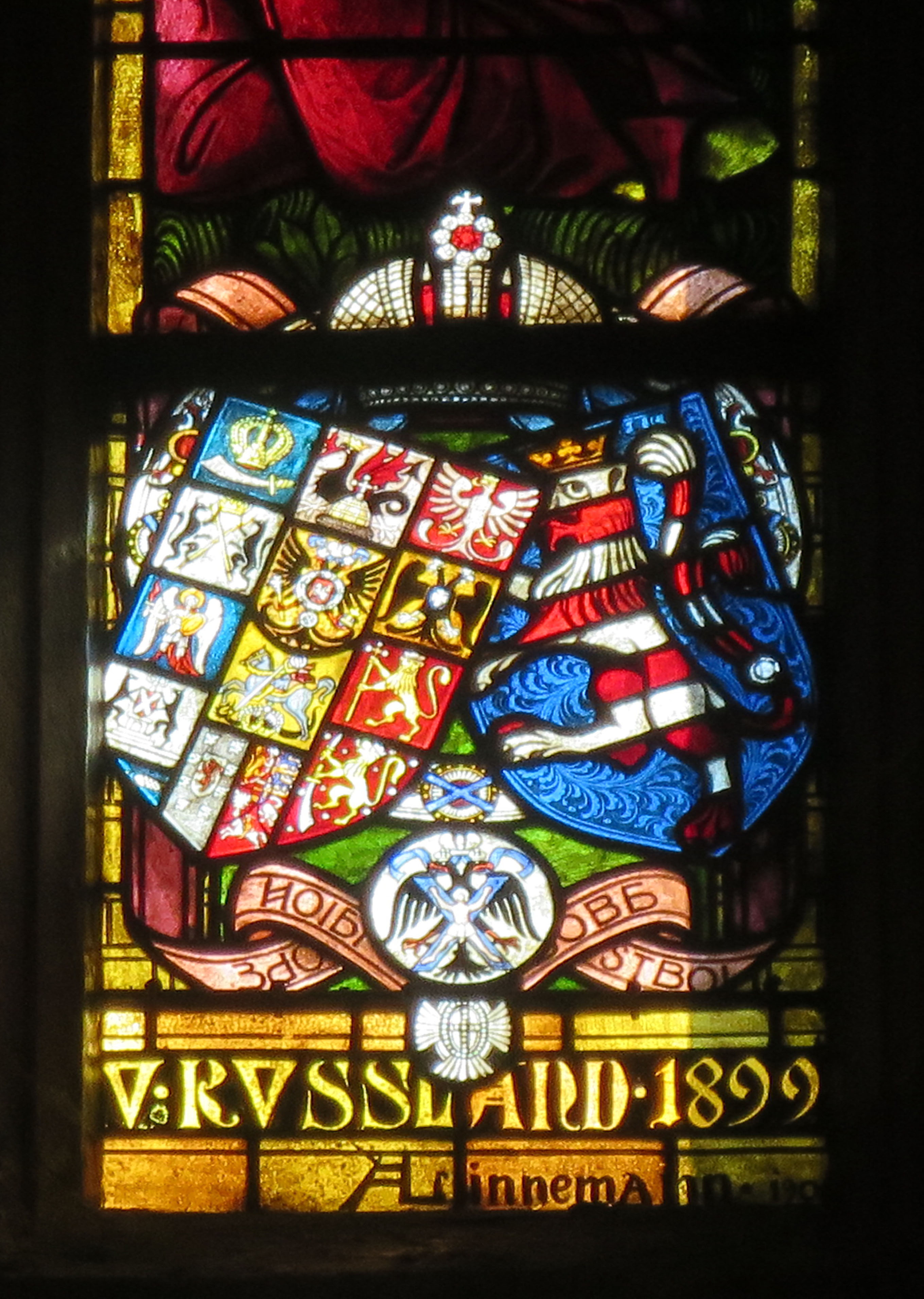 Ausschnitt aus einem von Zarin Alexandra Fjodorowna von Russland gestifteten Fenster in der Stadtkirche Friedberg mit hessisch-russischem Allianzwappen